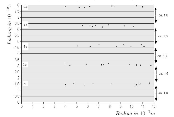 Bestimmung der Elementarladung Mittels des Millikan-Versuchs